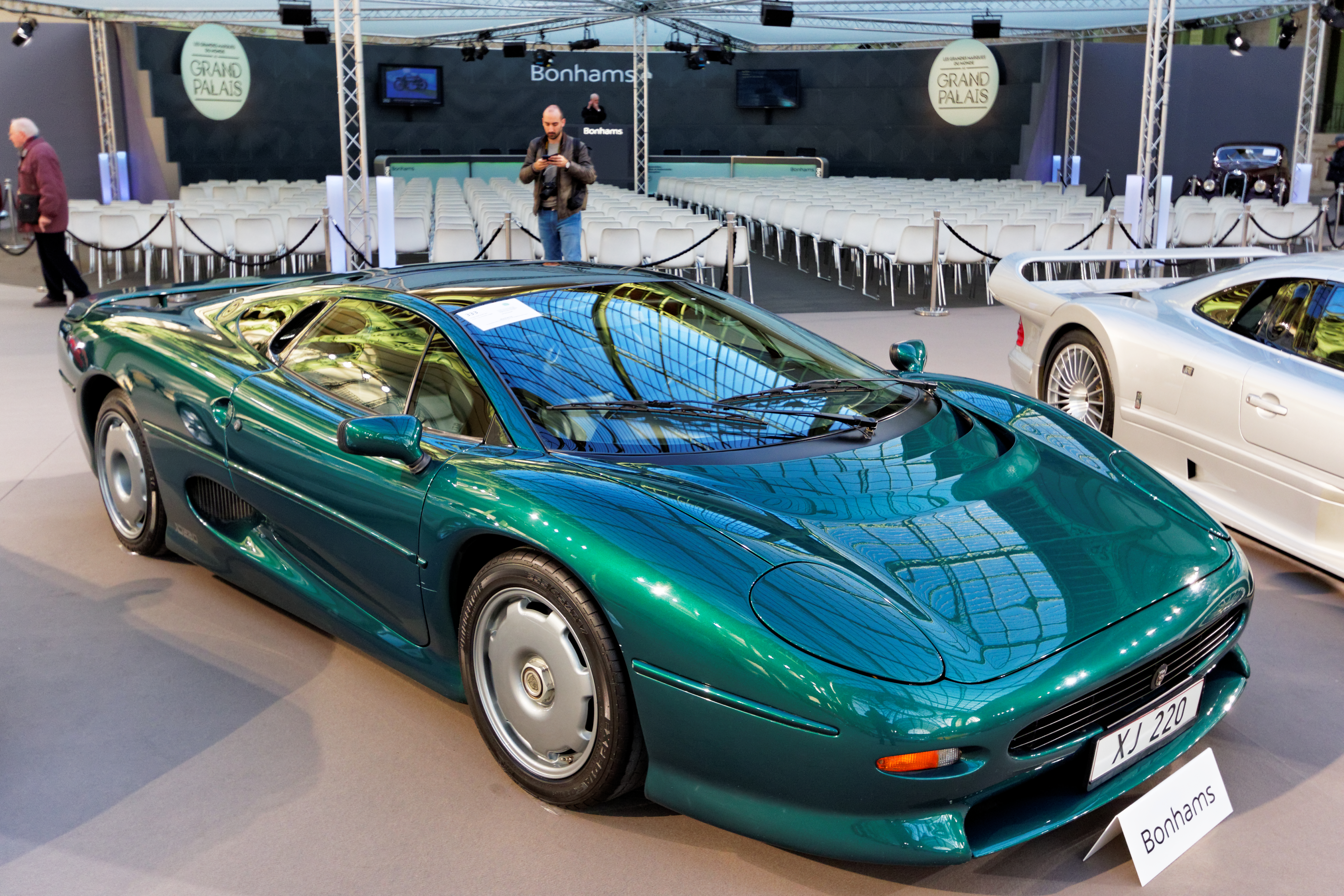 Un des véhicules présenté lors de la vente aux enchères Bonhams 2016 au Grand Palais de Paris.